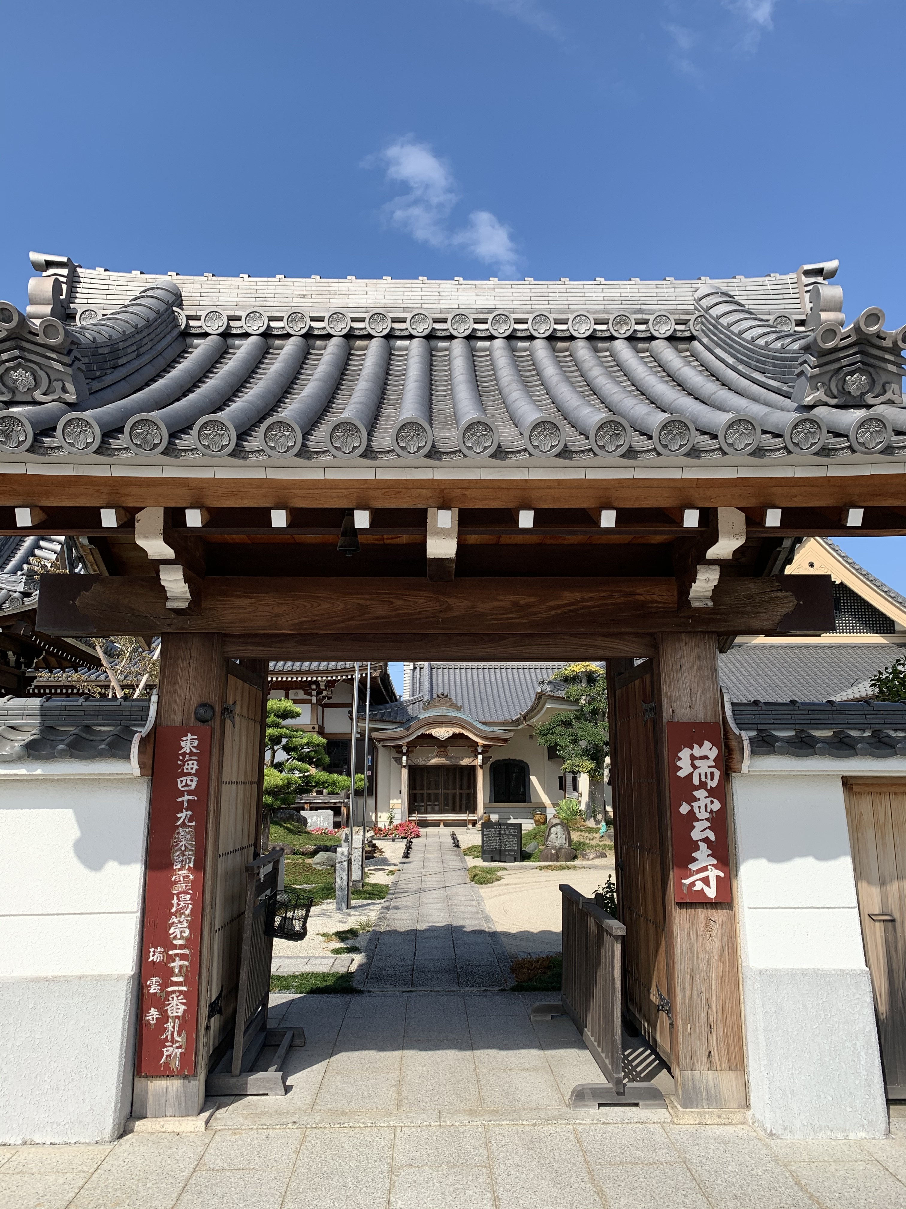 瑞雲寺の山門